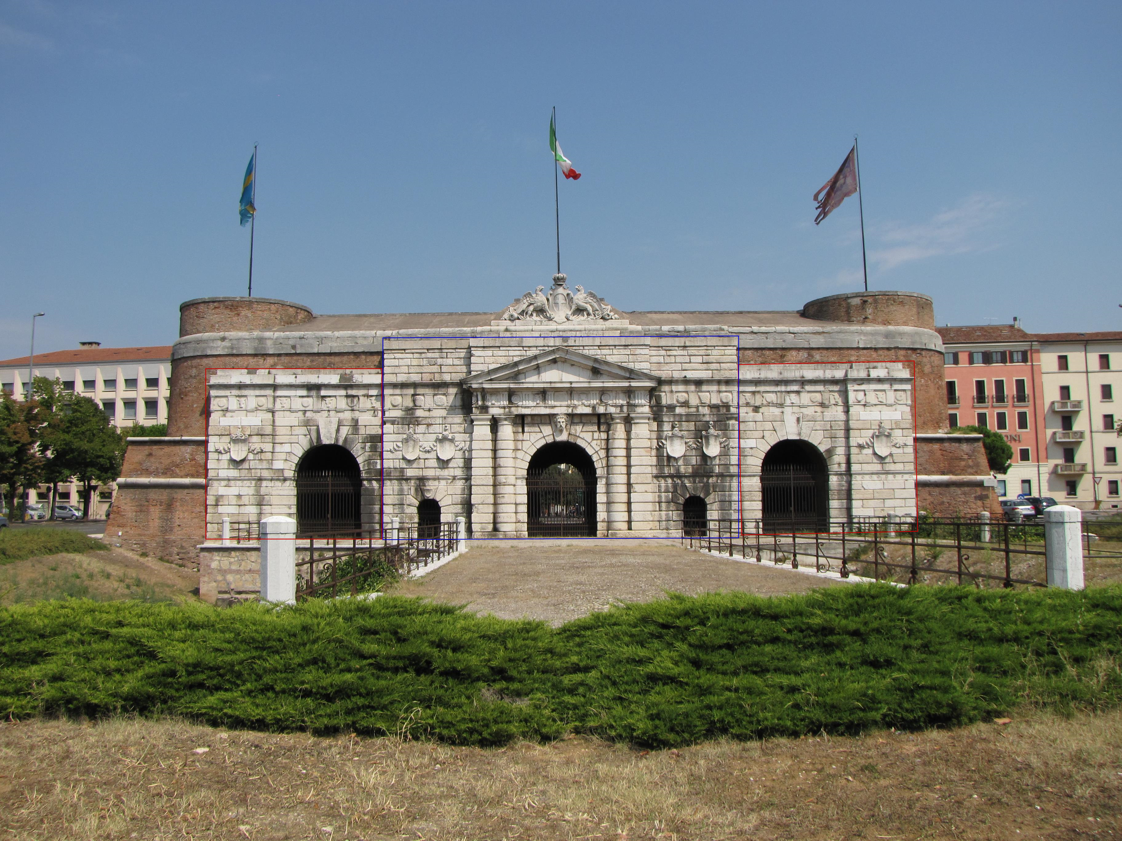 Prospetto verso la campagna di Porta Nuova (Verona), con evidenziata in blu la parte originale progettata da Michele Sanmicheli e in rosso le aggiunte ottocentesche austriache.